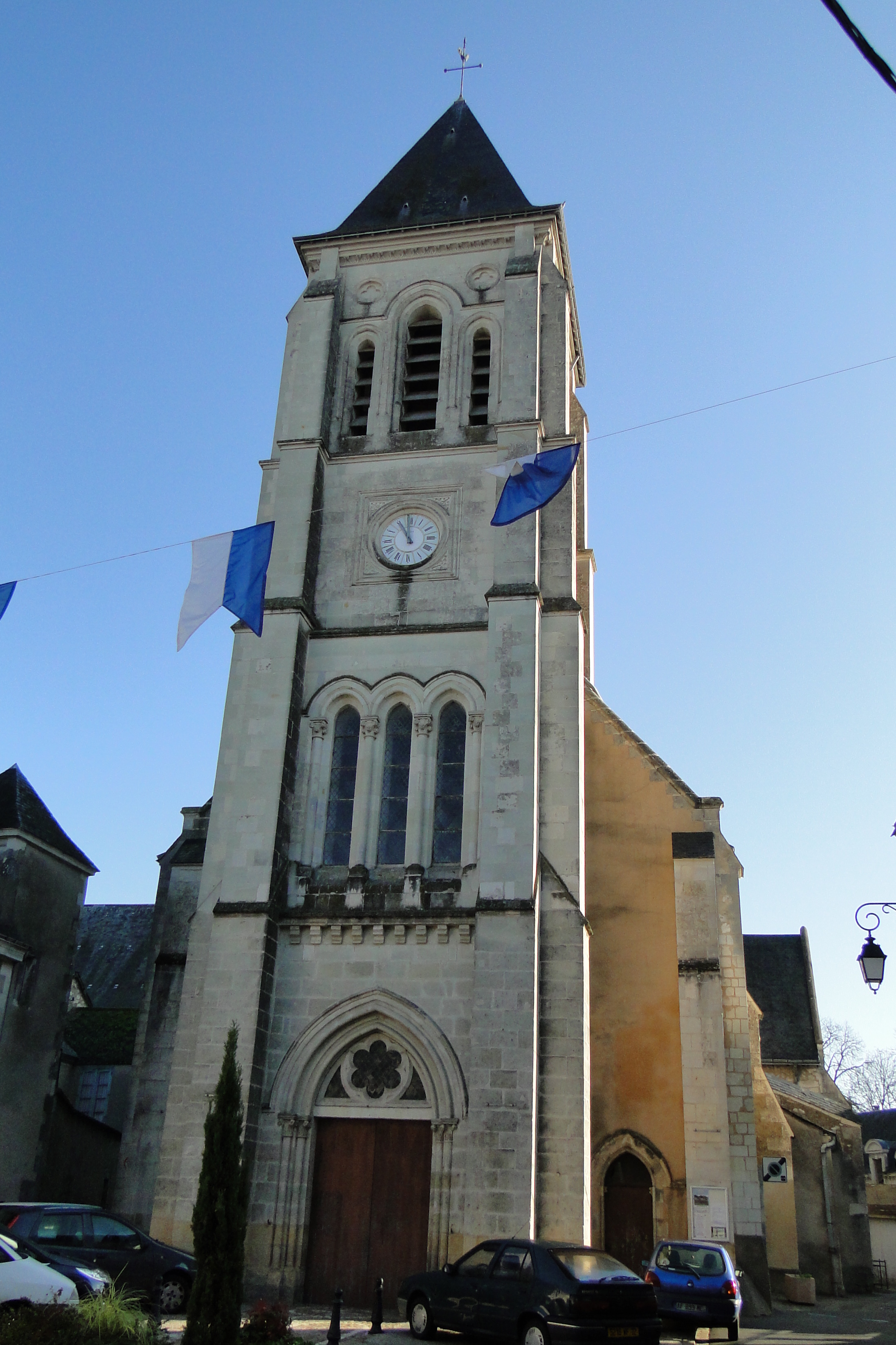 Eglise Saint-Vincent du Lude (Sarthe)